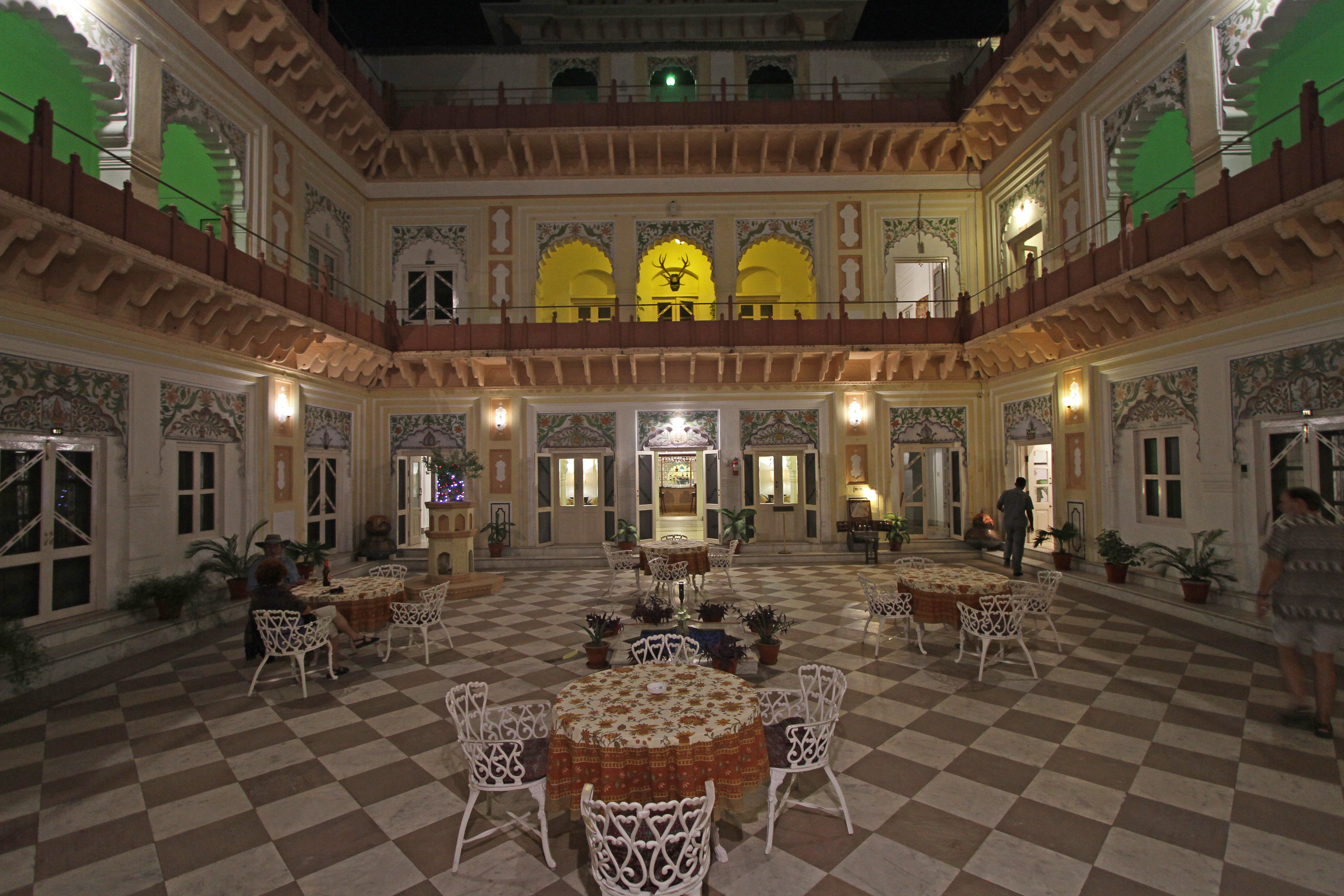 Laxmi Vilas Palace (Bharatpur)